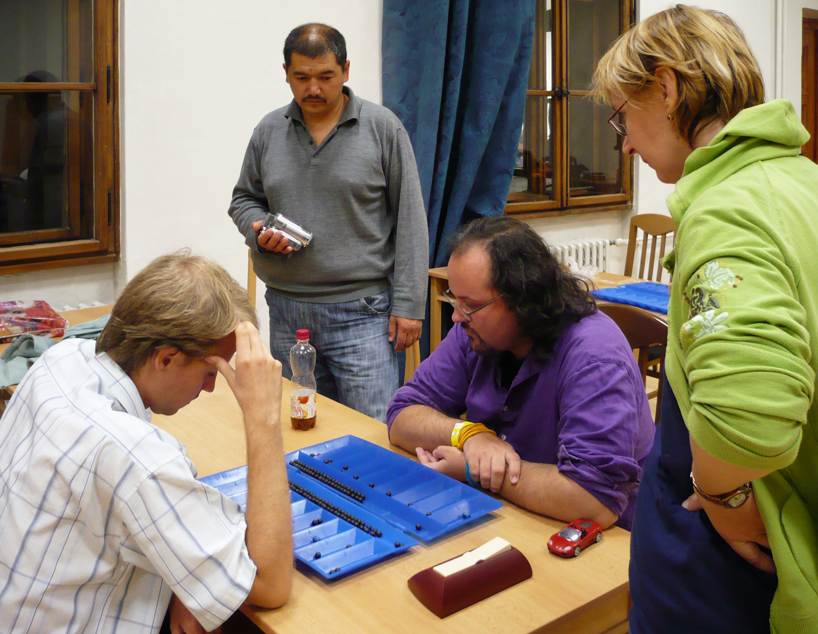 Deskohraní 2008